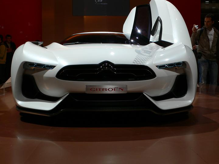 GT by Citroën